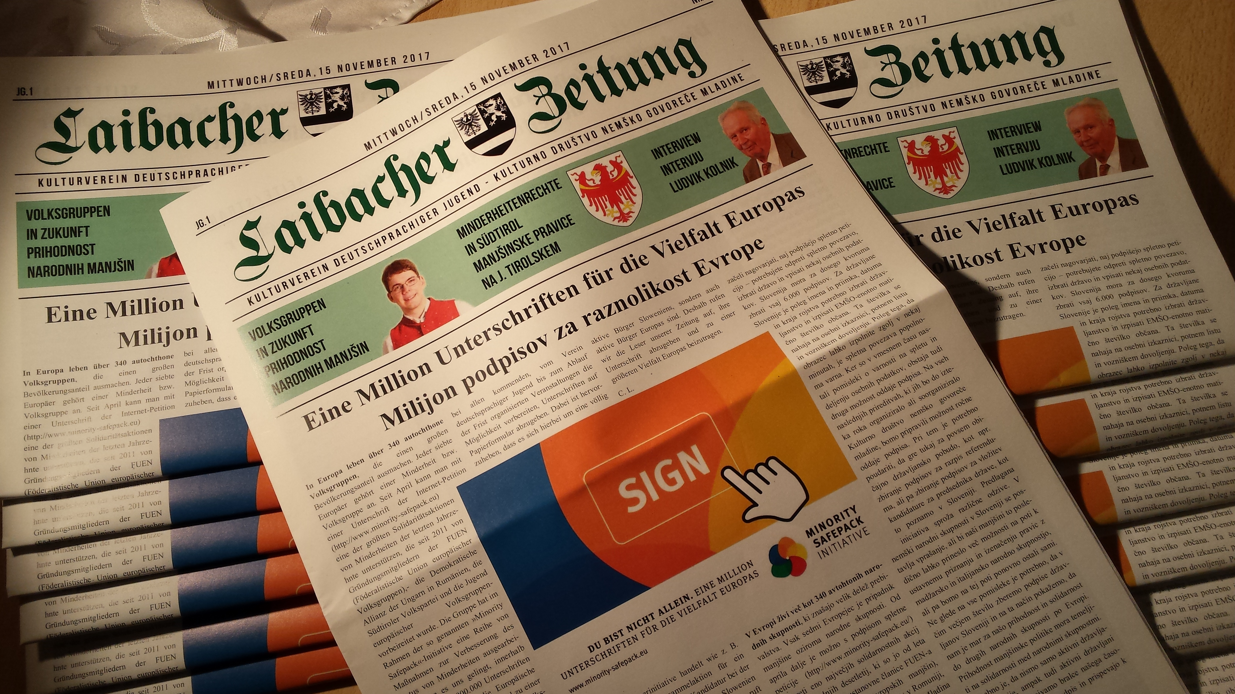 Nova izdaja Laibacher Zeitung-a je deloma ohranila značilnosti zgodovinske izdaje časopisa